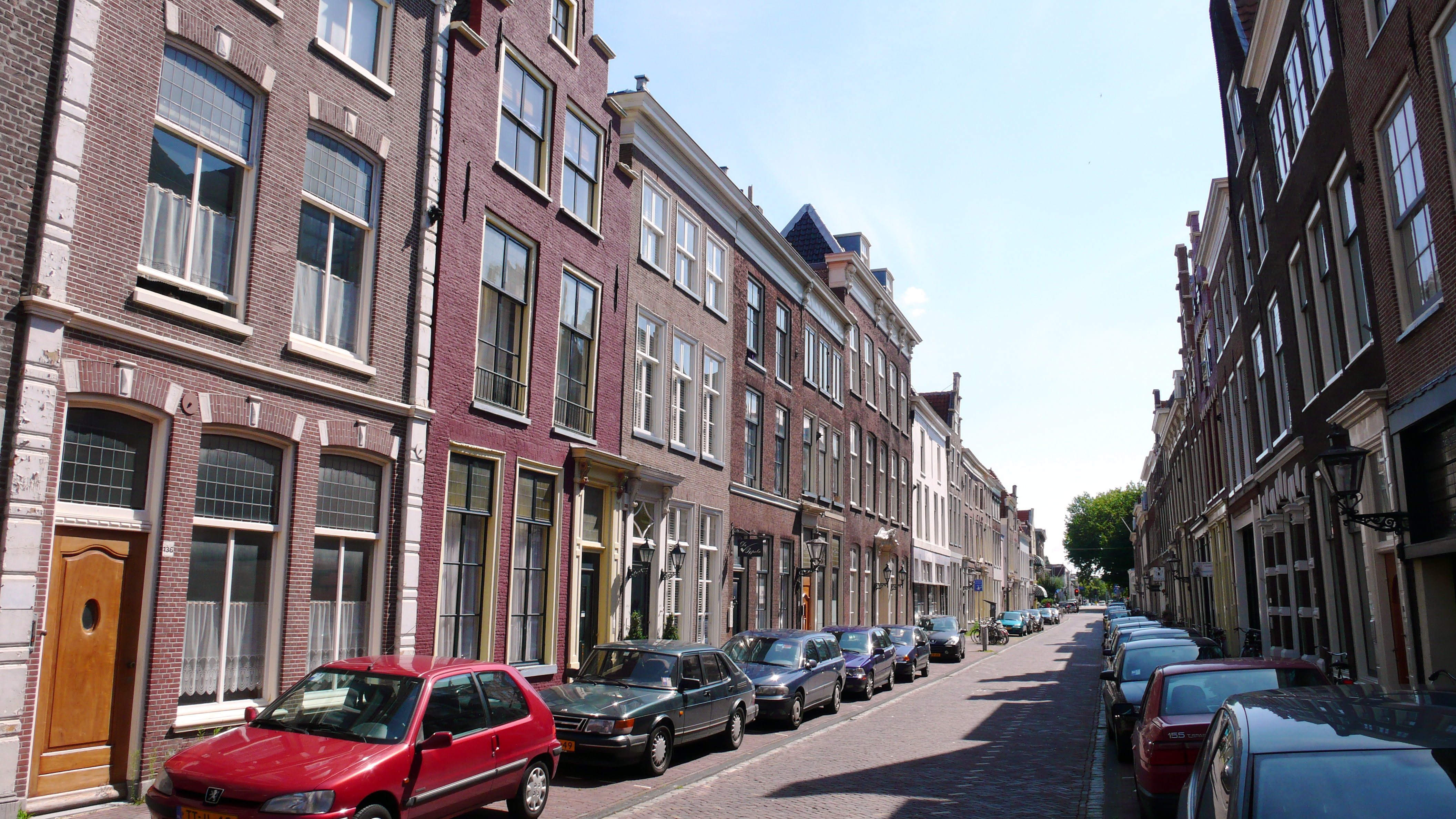 Hogewoerd, Leiden